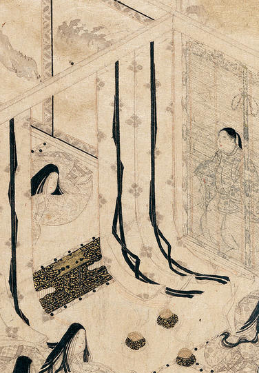 Japan; Albums; Paintings